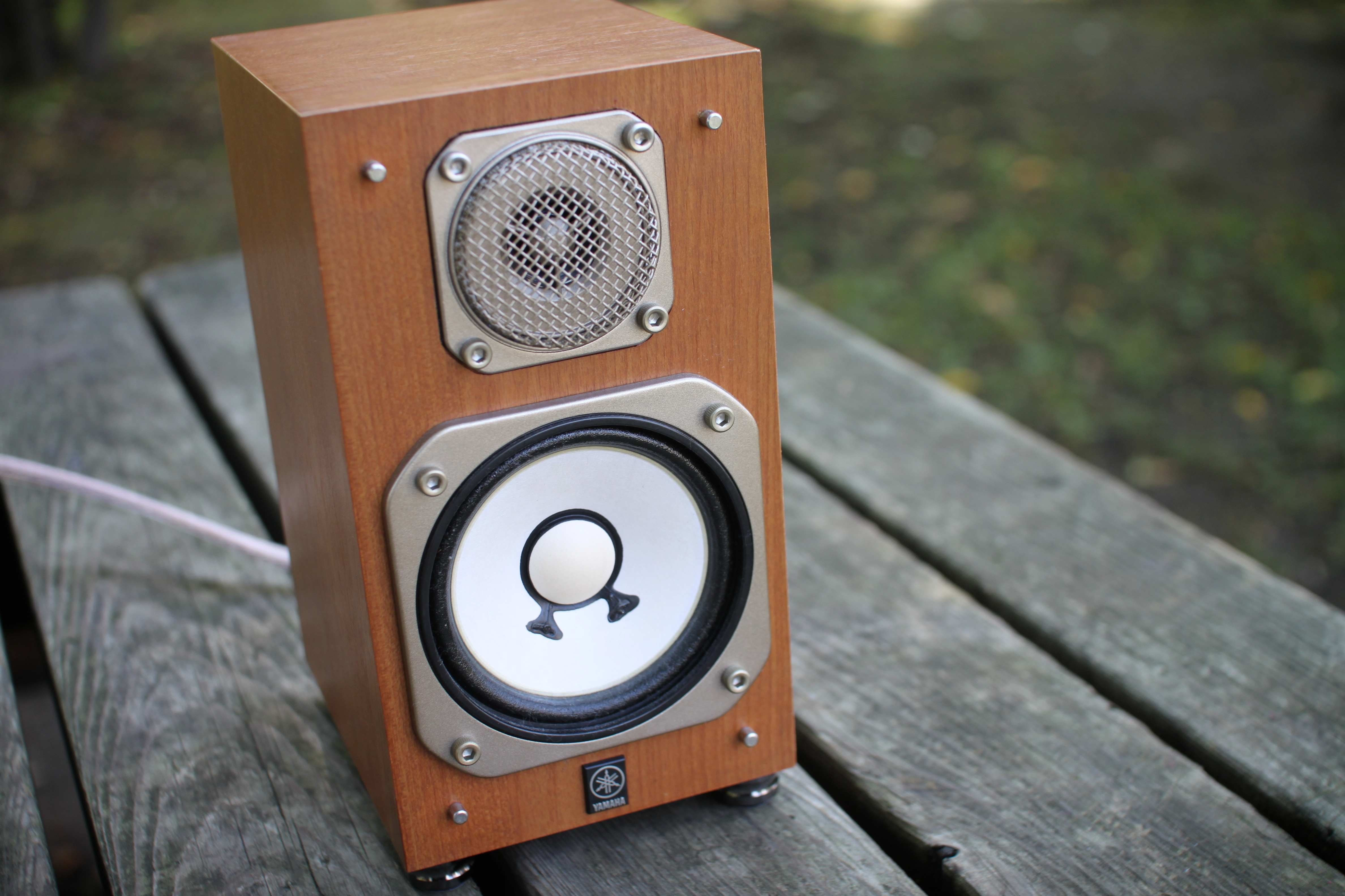 YAMAHA NS-10MMT